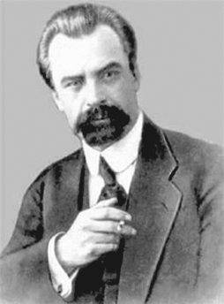 Володимир Кирилович Винниченко (1880-1951), український політичний діяч часів визвольних змагань 1917-21 рр., літератор і публіцист